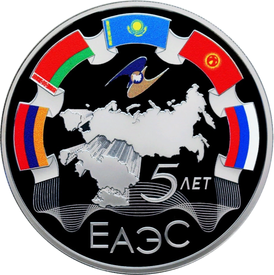 Монета Банка России, 5-летие ЕАЭС. 3 рубля, 2019 г., серебро, реверс, пруф. Очертания стран — членов ЕАЭС, вверху по окружности — выполненные в цвете изображения флагов стран — членов ЕАЭС, продолженные внизу изгибающимися линиями; под флагами — выполненная в цвете эмблема ЕАЭС; внизу — надписи «5 ЛЕТ» и «ЕАЭС». Чеканка — Санкт-Петербургский монетный двор. Художник: С.В. Сутягин. Скульптор: компьютерное моделирование.